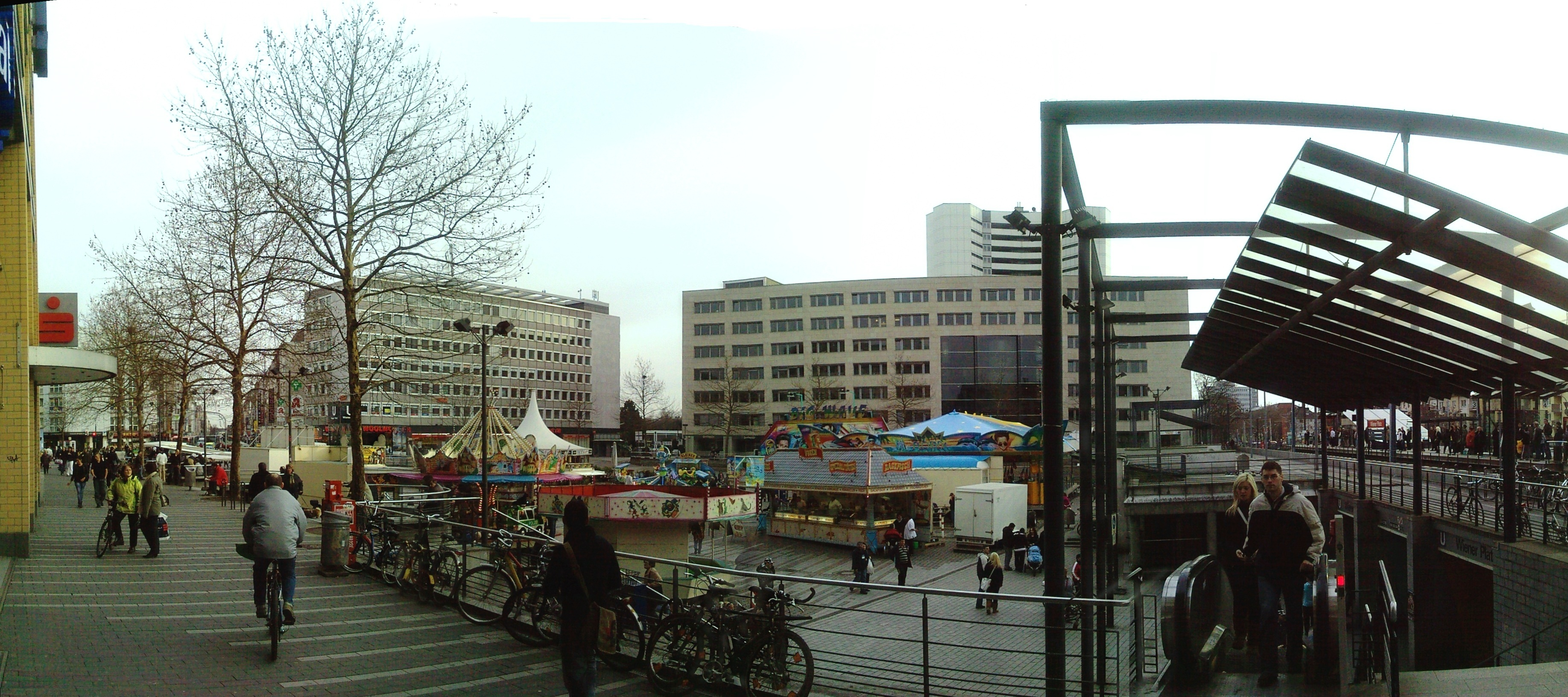 Panoramaansicht Wiener Platz, Köln-Mülheim